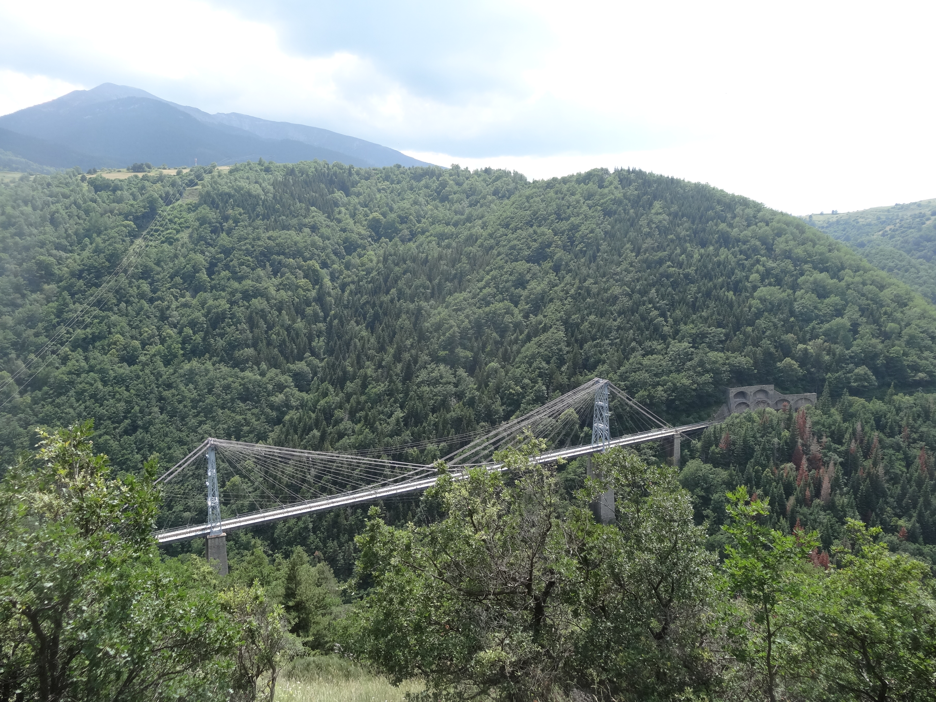 Pont Gisclard (juliol 2013)